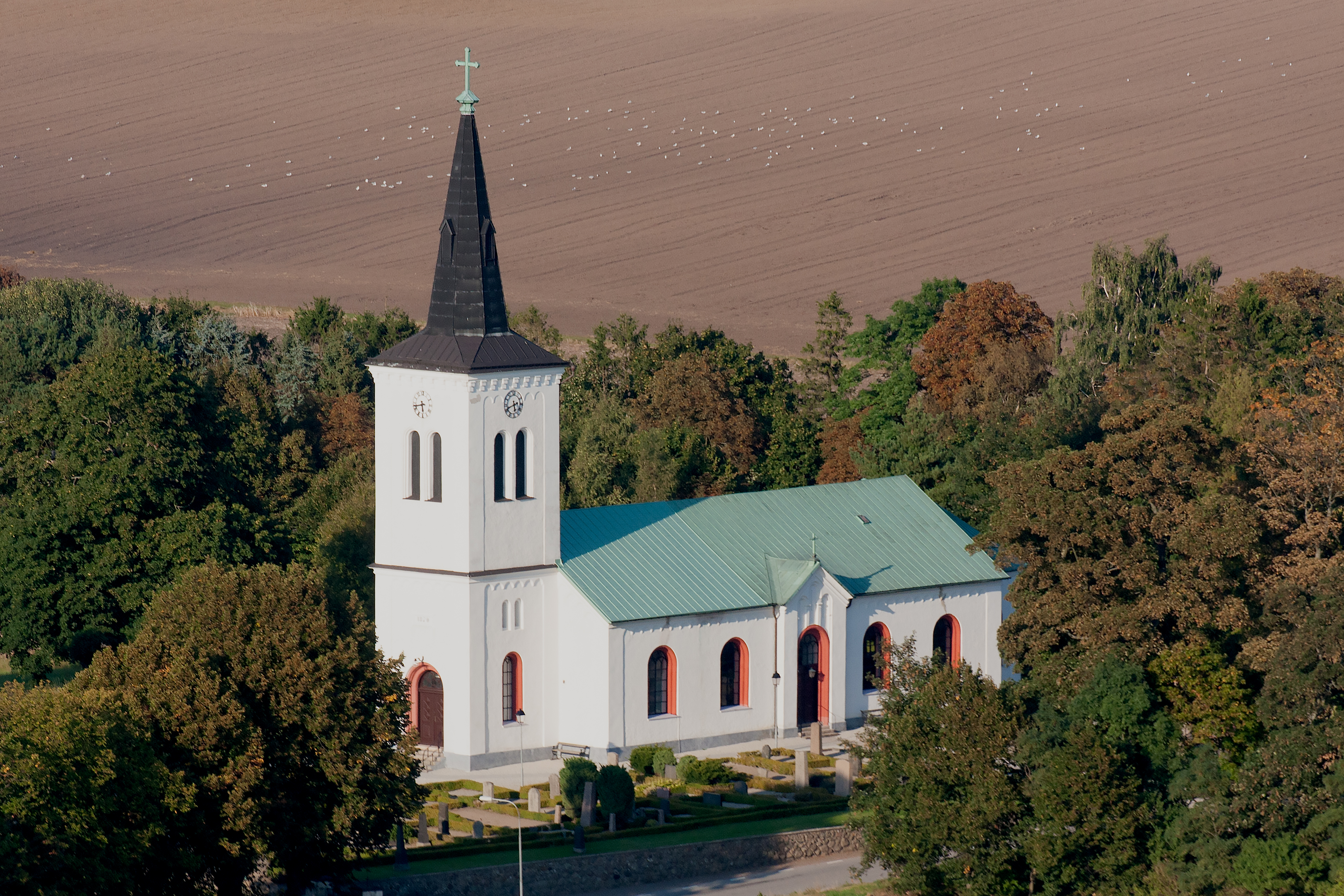 Södervidinge kyrka.